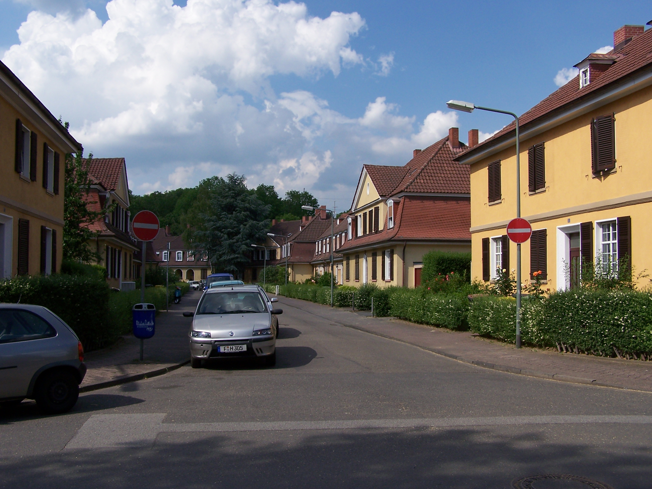 Südliches Ende der Ferdinand-Hofmann-Straße am Richard-Weidlich-Platz